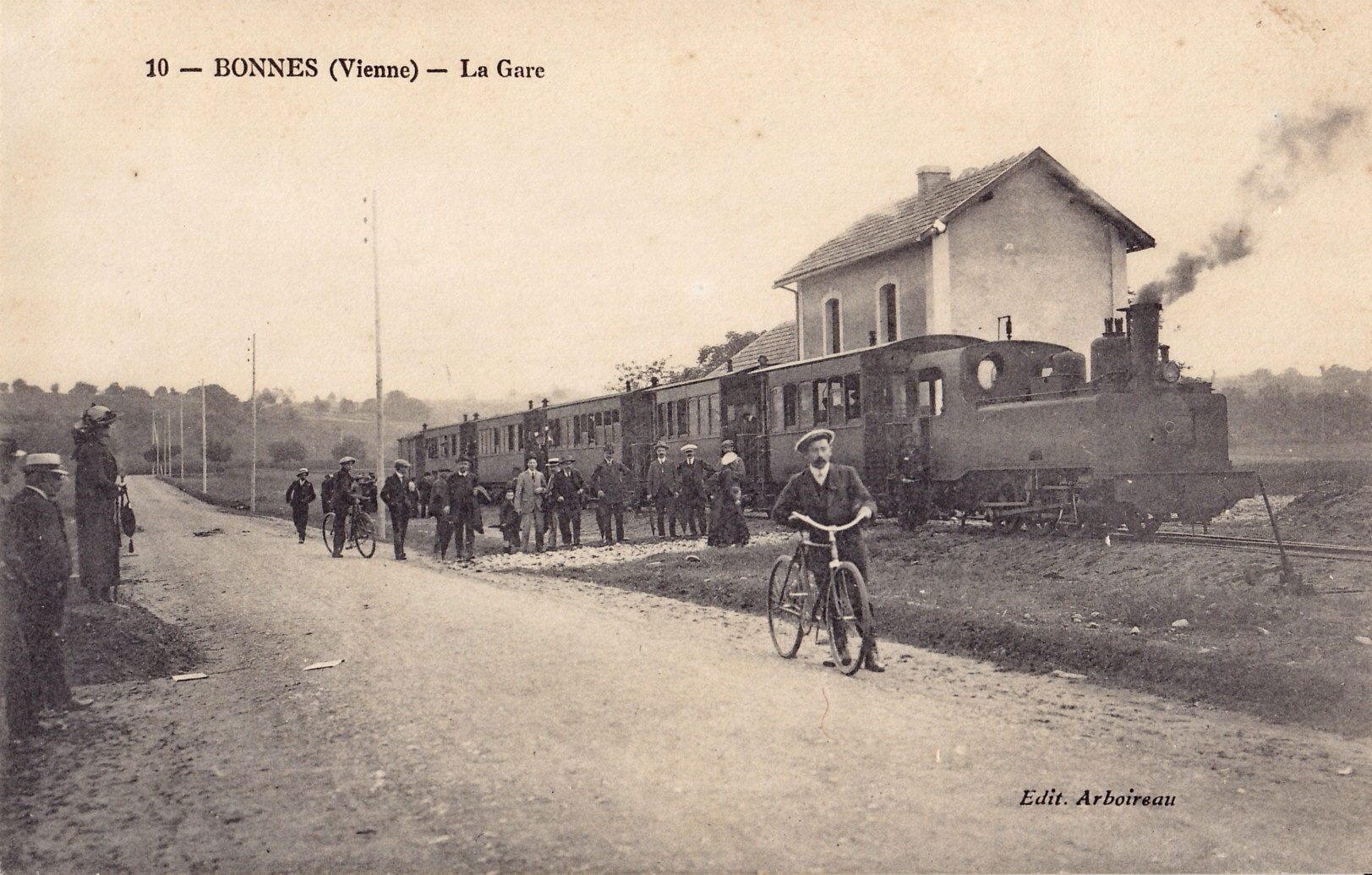 Carte postale ancienne éditée par Arboireau, n°10 : BONNES - La gare